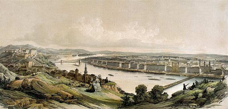 Pest-Buda látképe a Gellérthegyről, 1853 Magyar Nemzeti Múzeum, Történeti Képcsarnok, Budapest